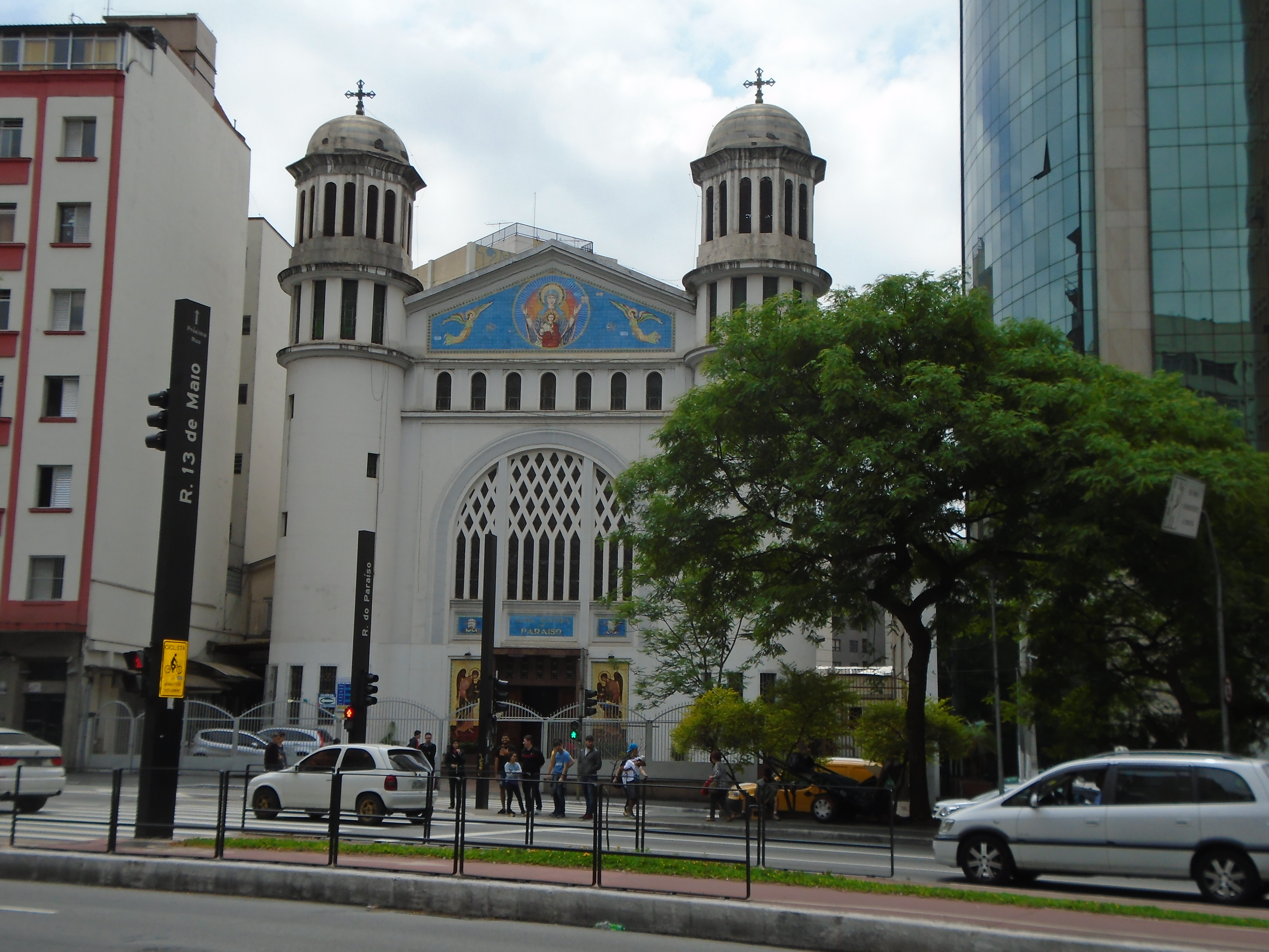 Catedral de Nossa Senhora do Paraíso, São Paulo